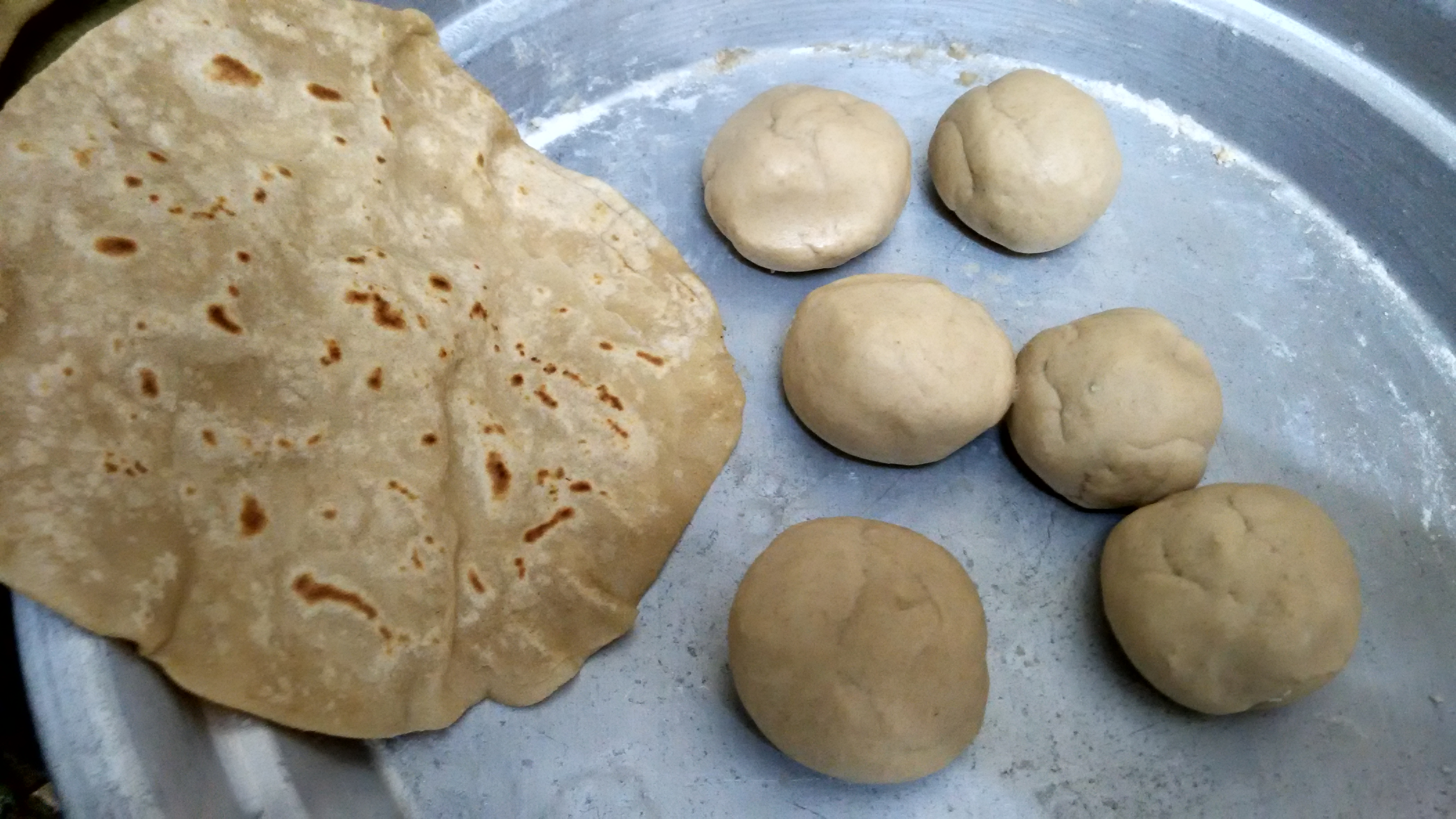 சப்பாத்தி உருவாக்கம்.